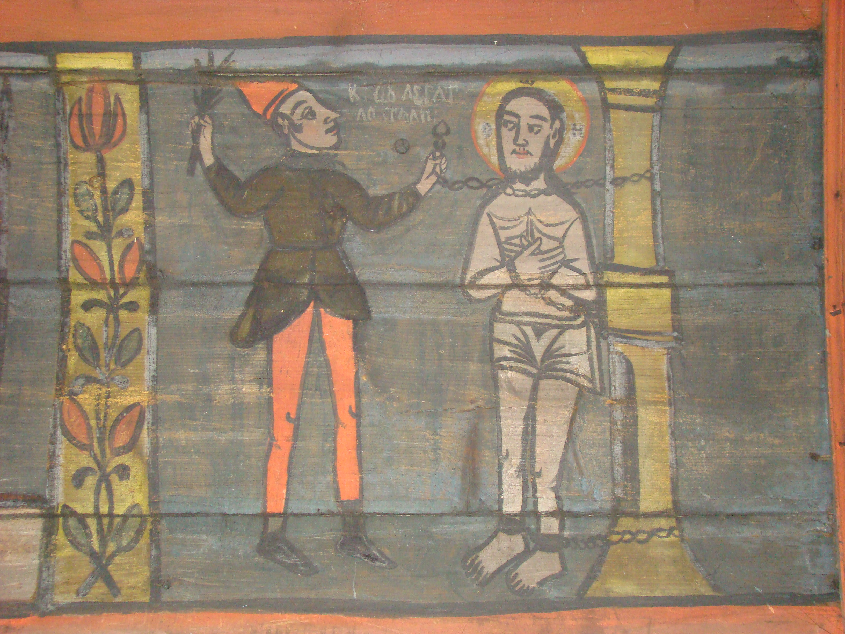 Biserica de lemn „Sf.Dumitru” din Păușa, județul Bihor